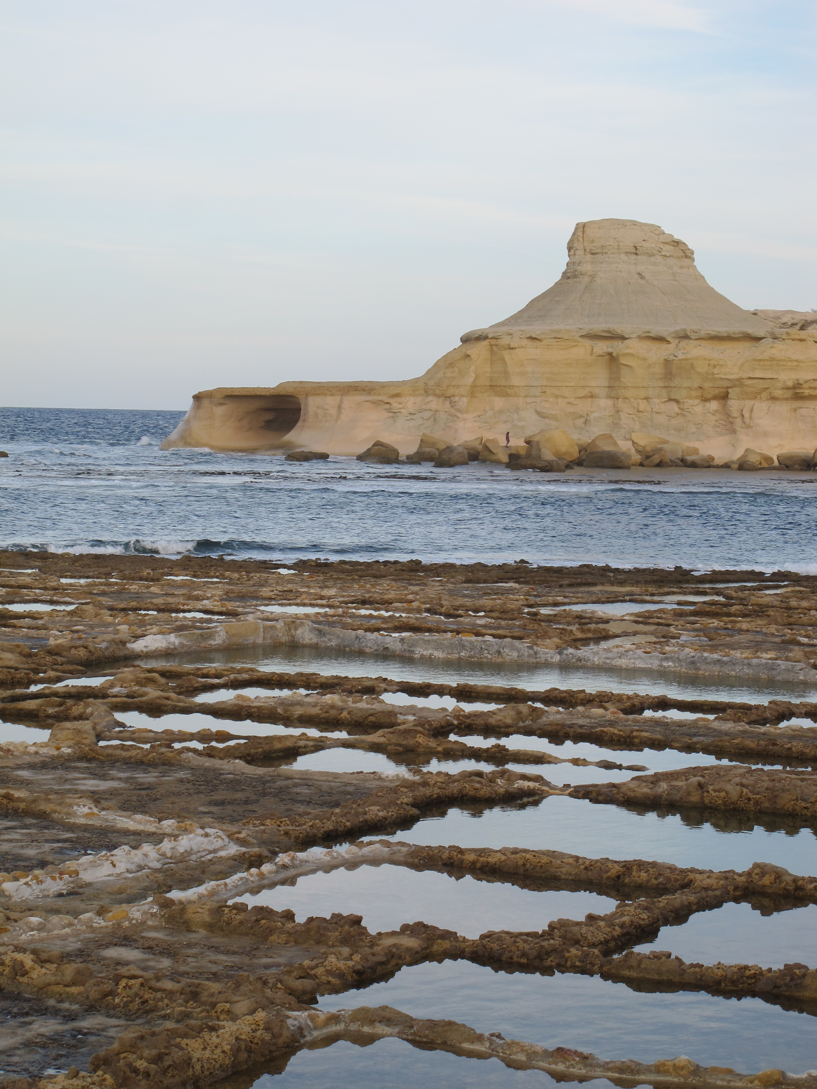 Xwejni Bay Nov 2014